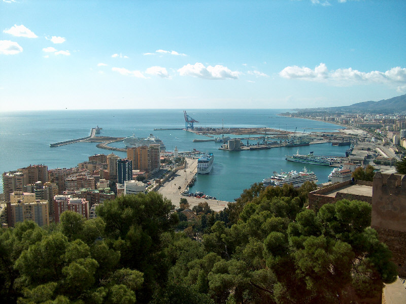 Puerto de Málaga